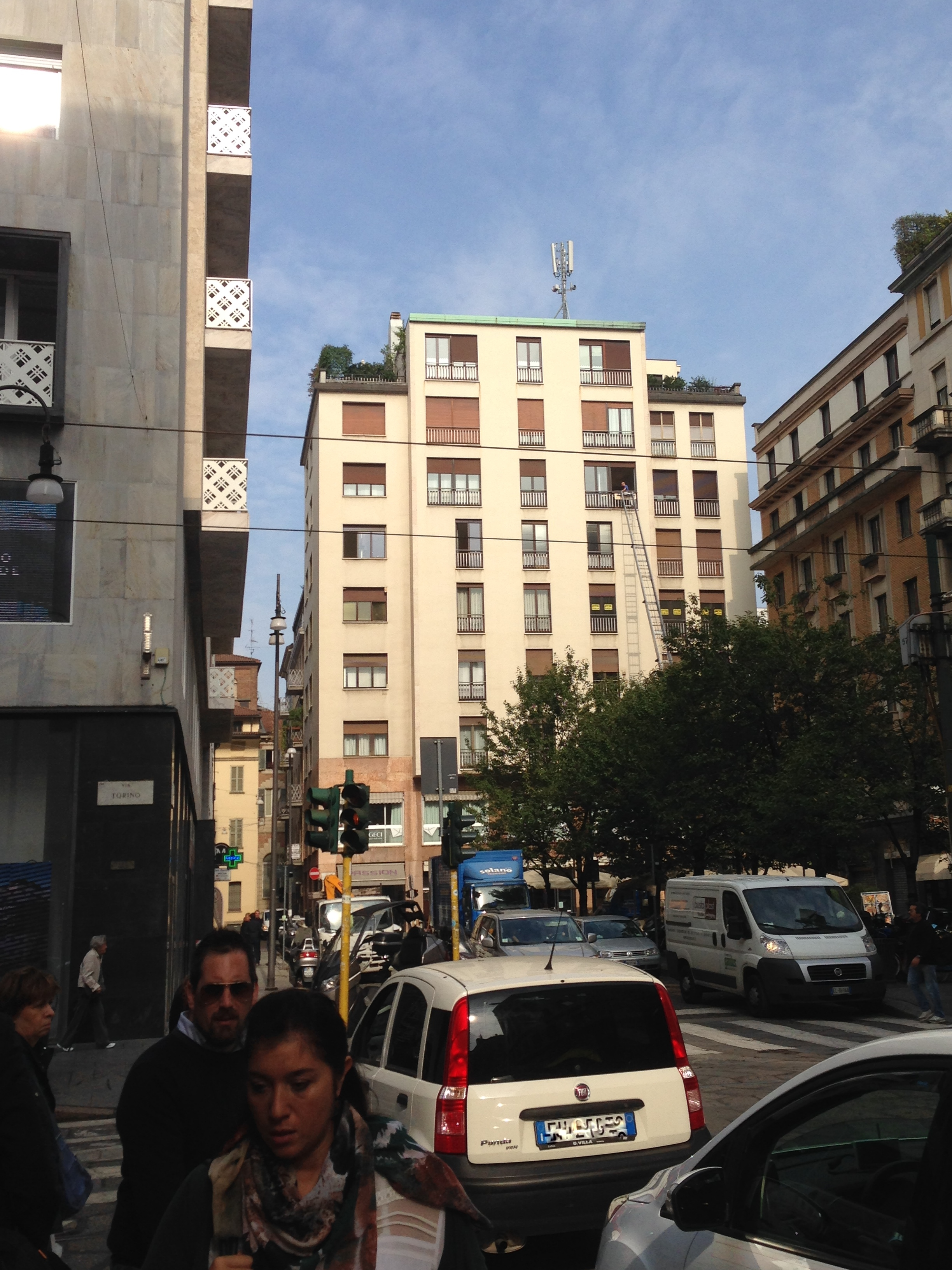 Milano - Via Delle Asole